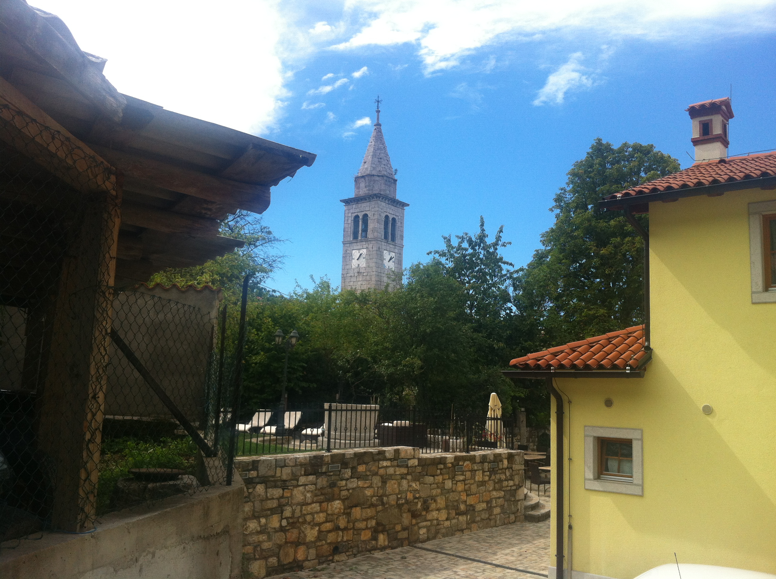 AMI 2013